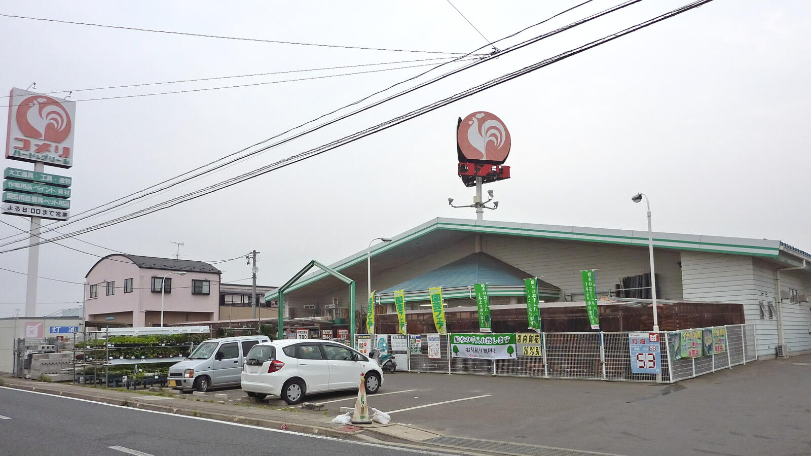 コメリ鹿島店